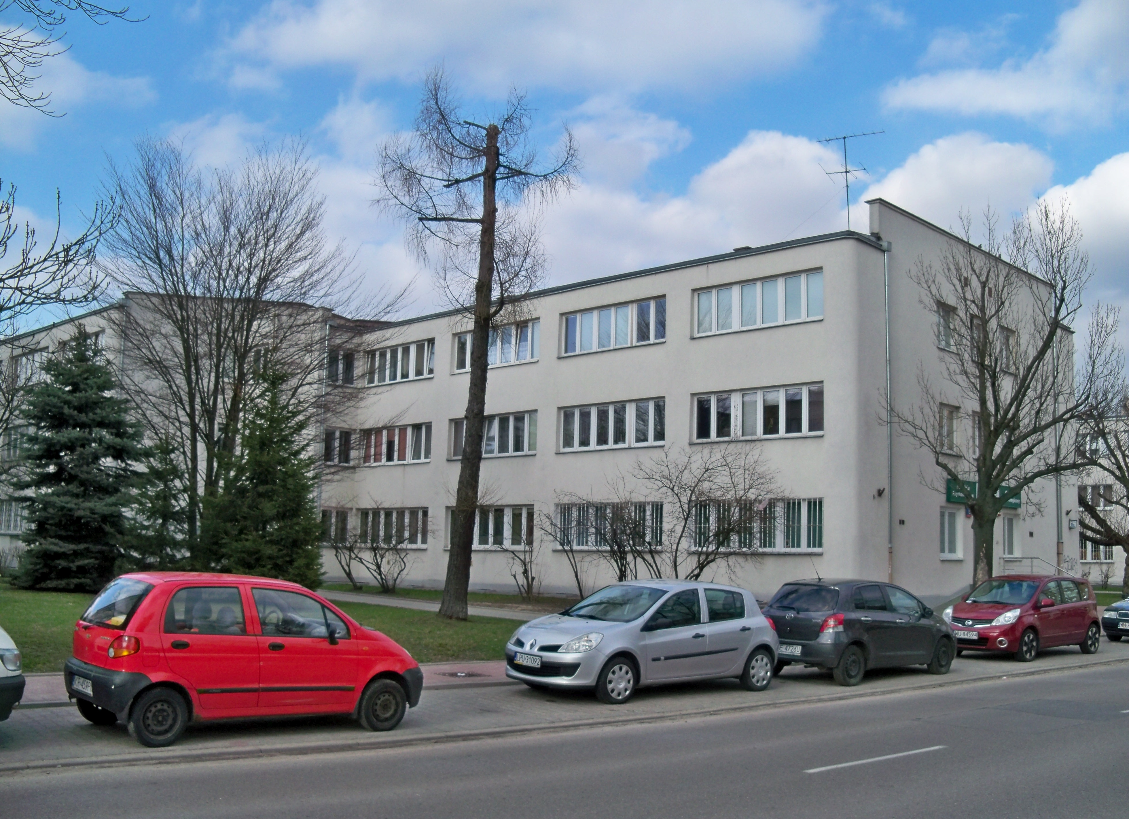 Jeden z przedwojennych bloków WSM na Rakowcu